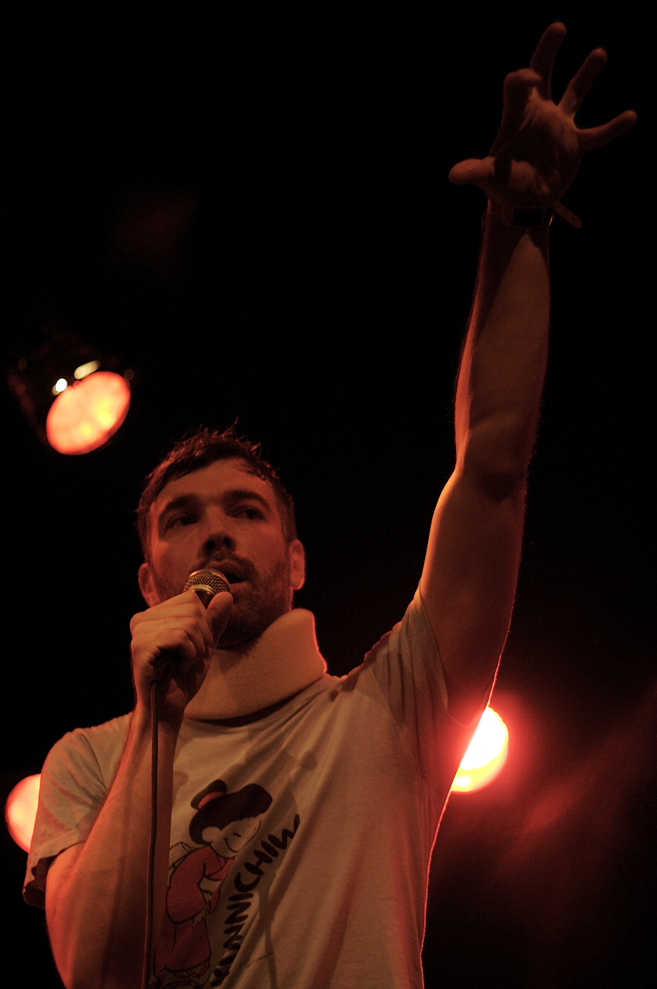 Buck 65 Live @ Storsjöyran, Östersund '07.